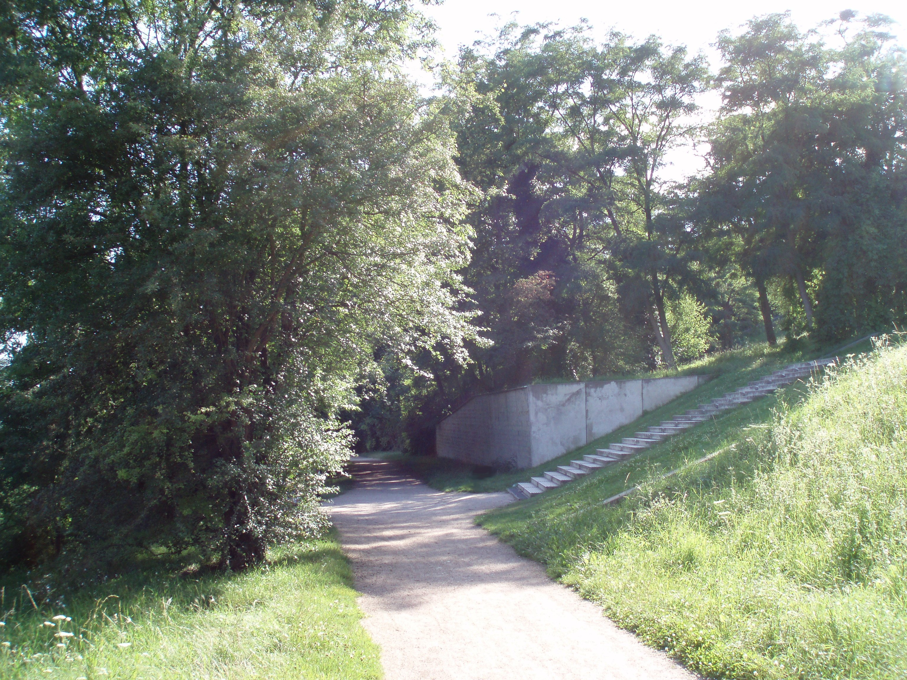 Ancienne ligne de chemin de fer CGB au croissement de l'axe majeur à Cergy.